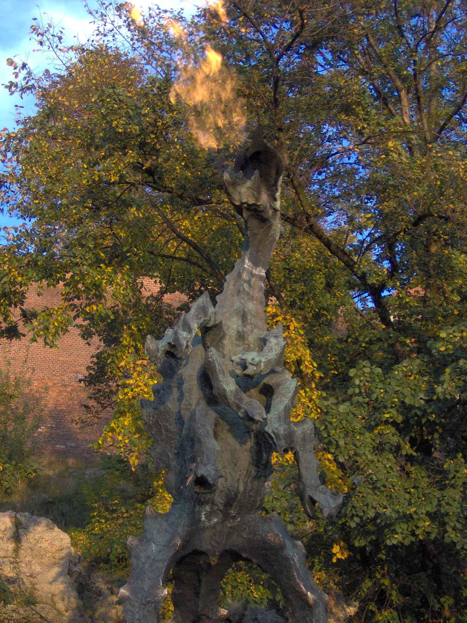 Smok Wawelski, Kraków, Poland